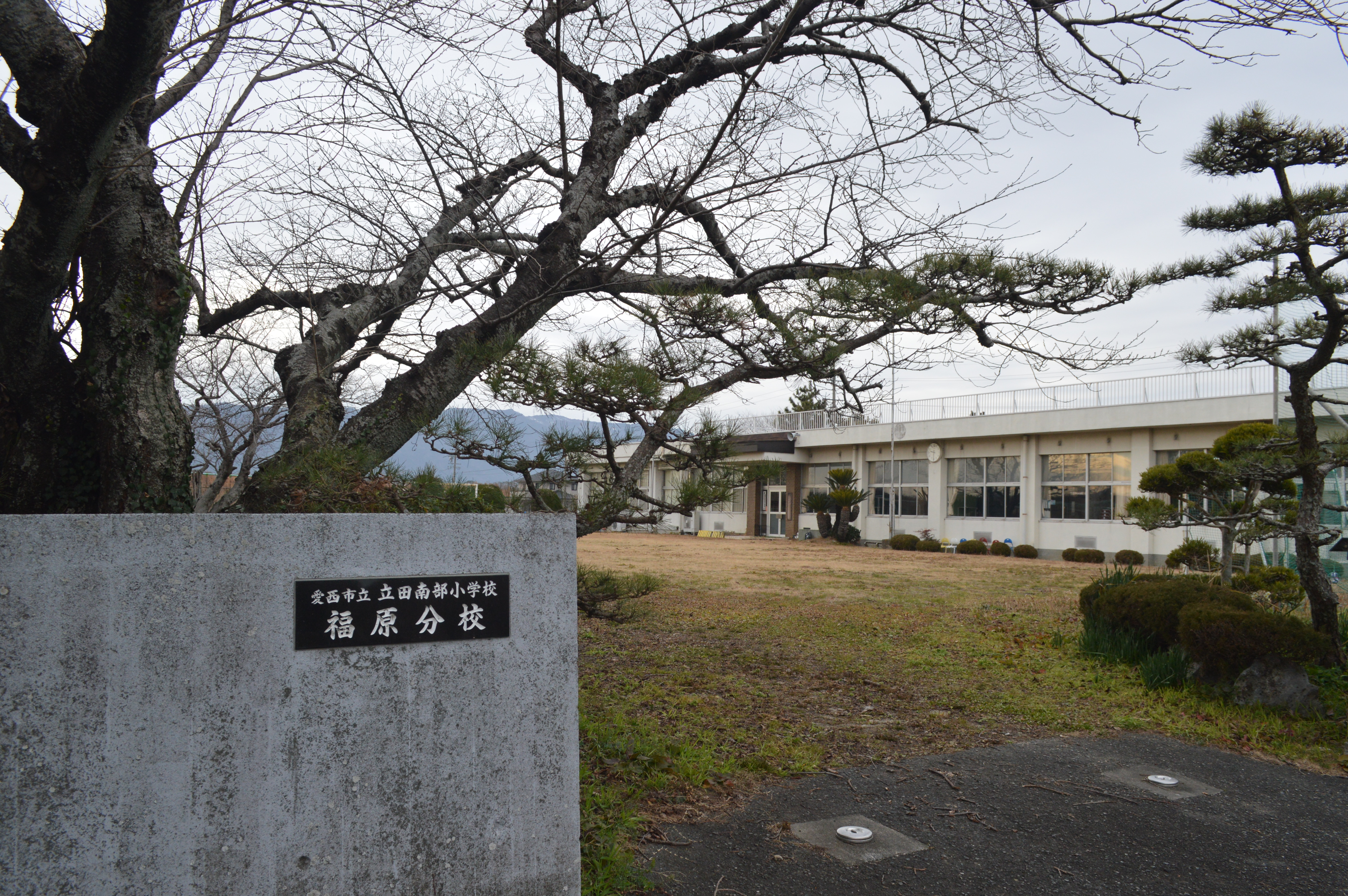 愛知県愛西市にある愛西市立立田南部小学校福原分校。2017年4月から休校。2019年3月廃校予定。